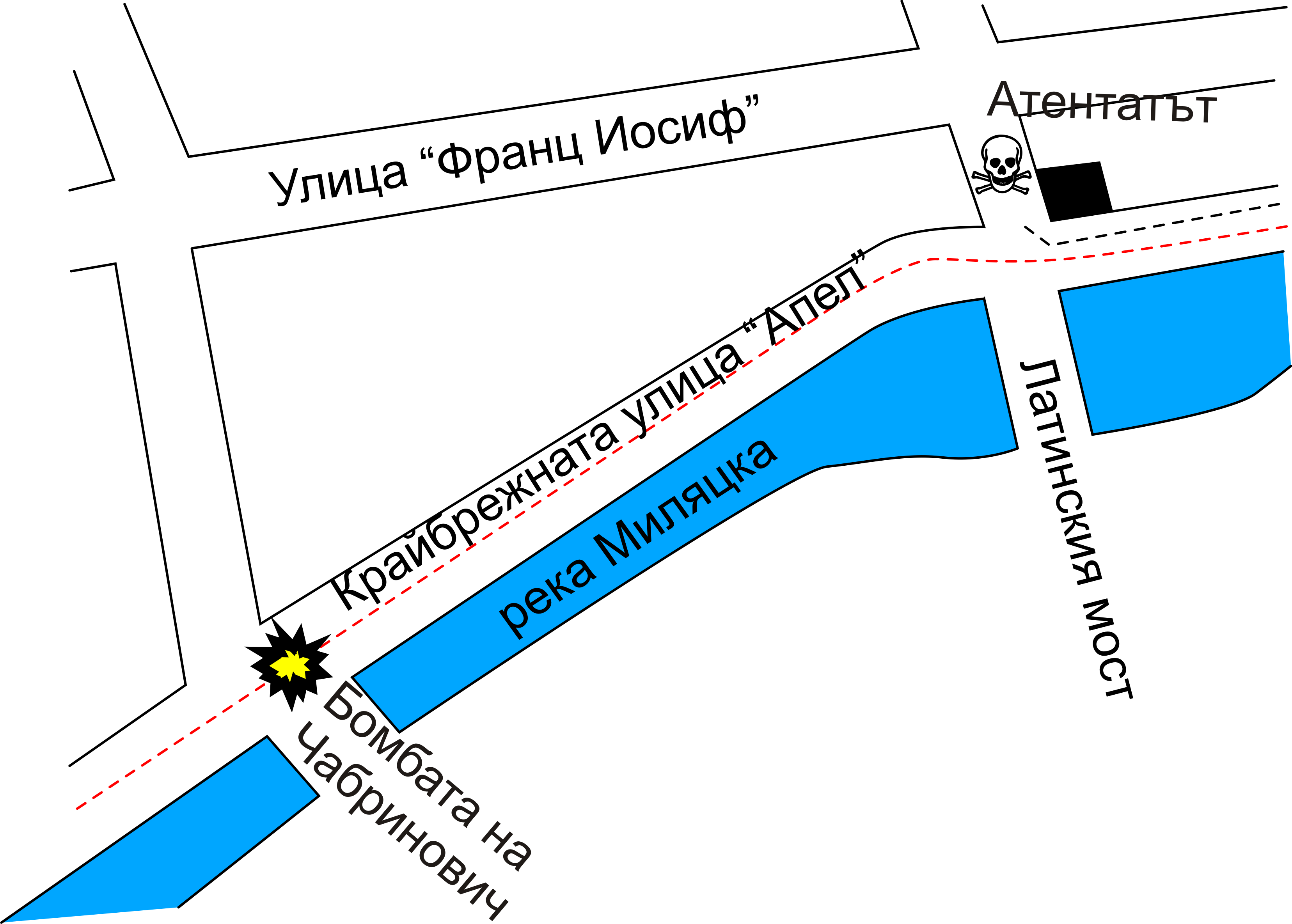 Схемата на сараевския атентат